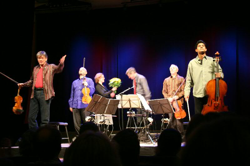 With Paul Hillier in Malmö fall 2005